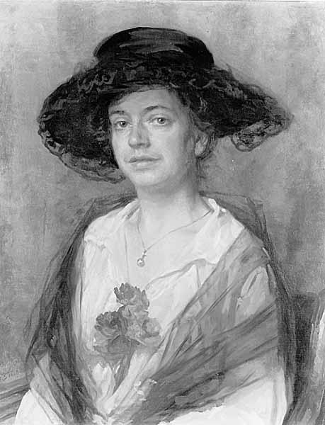 Portret van mevr. W.E.E. Tholen-de Ranitz (echtgenote van de schilder)